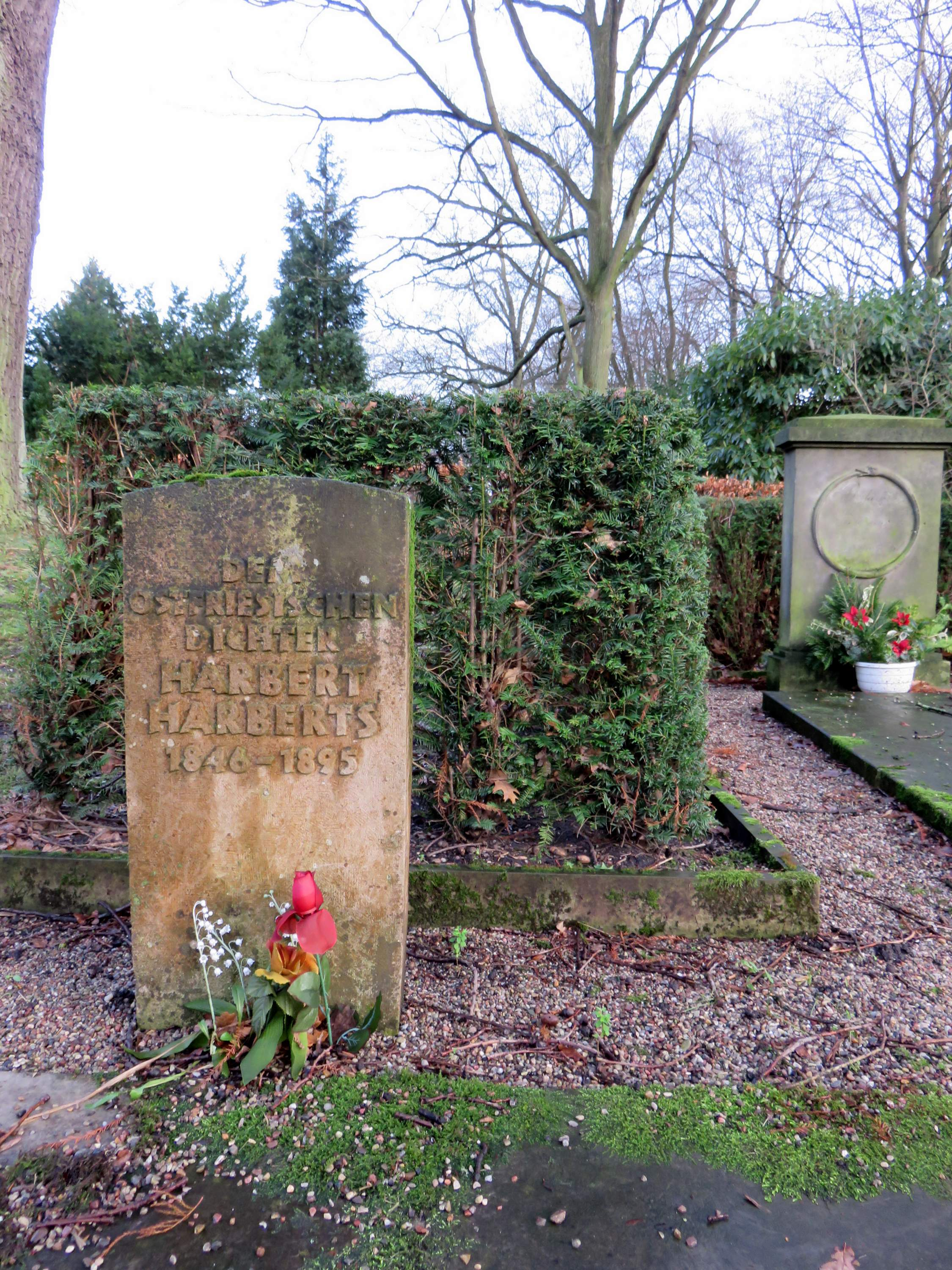 Grabstein für den Journalisten und Autor Harbert Harberts (1846-1895) in unmittelbarer Nachbarschaft zum Grabstein-Ensemble von Juliane Louise von Ostfriesland auf dem Friedhof in Hamburg-Ohlsdorf, südöstlich T-Teich und Freilichtmuseum Heckengarten gelegen. Siehe auch Infotext auf der Stele.